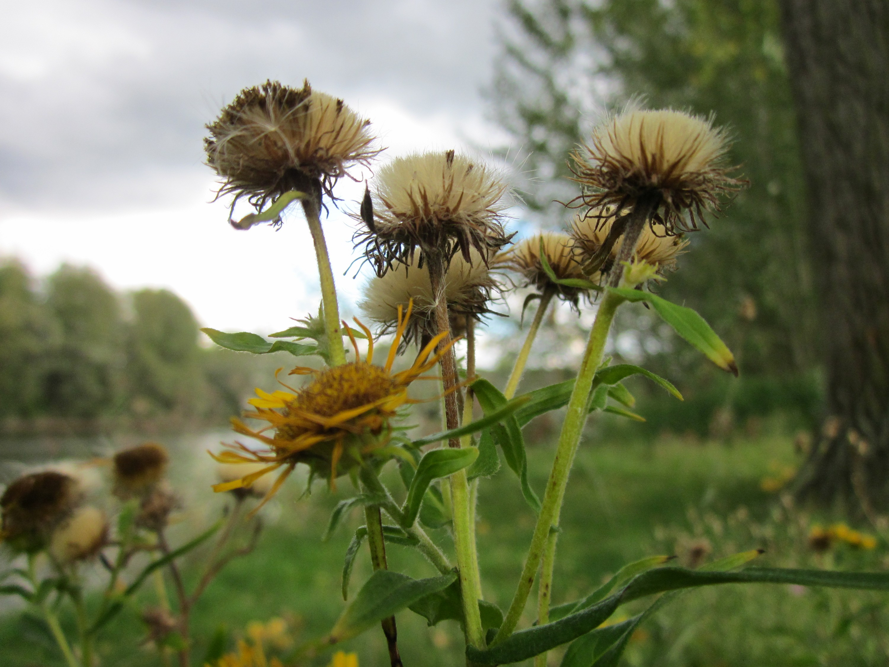 Wiesen-Alant (Inula britannica) im Rheinauenwald bei Altlußheim